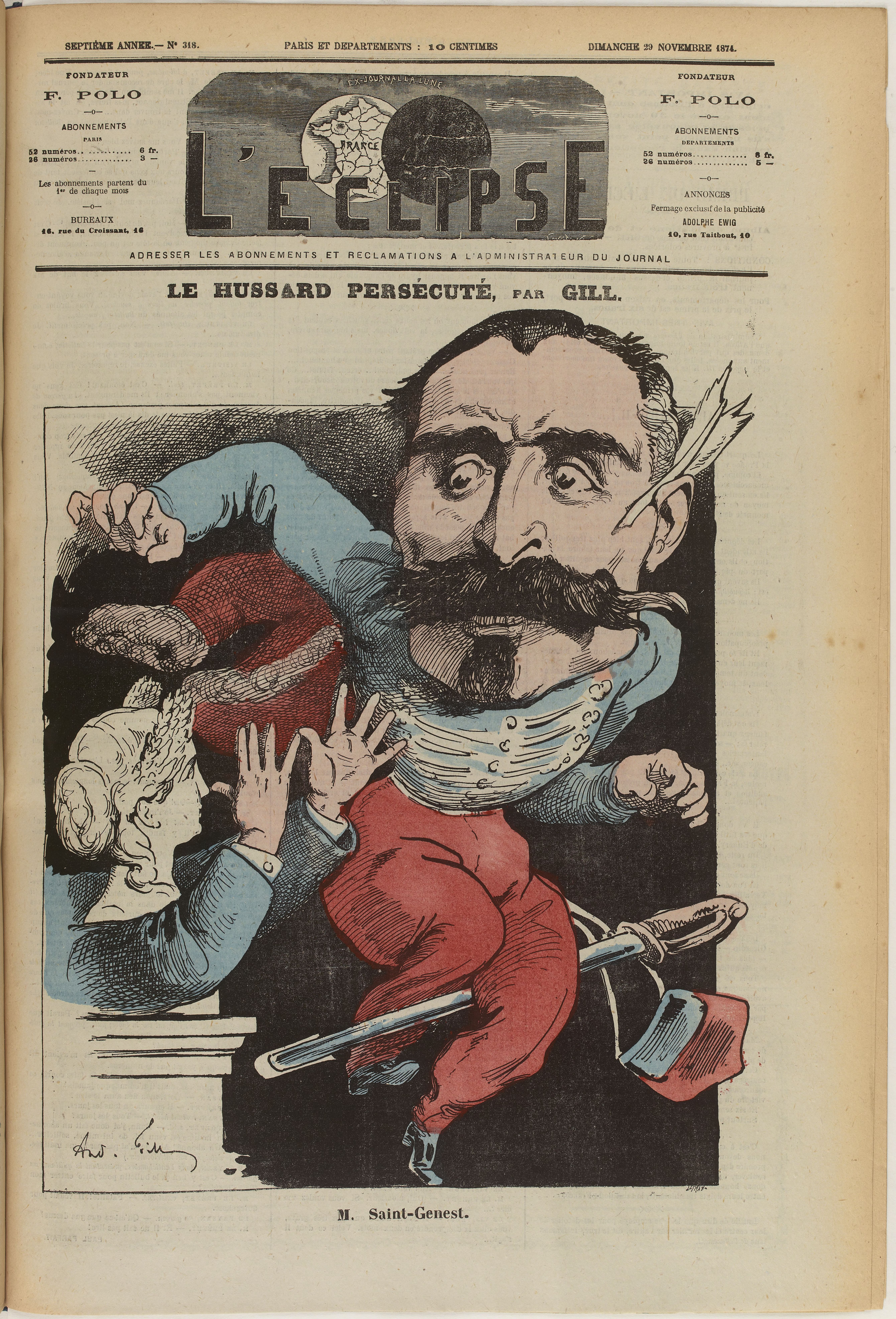 Une de L’Éclipse du 29 novembre 1874 : "Le hussard persécuté. Saint-Genest".